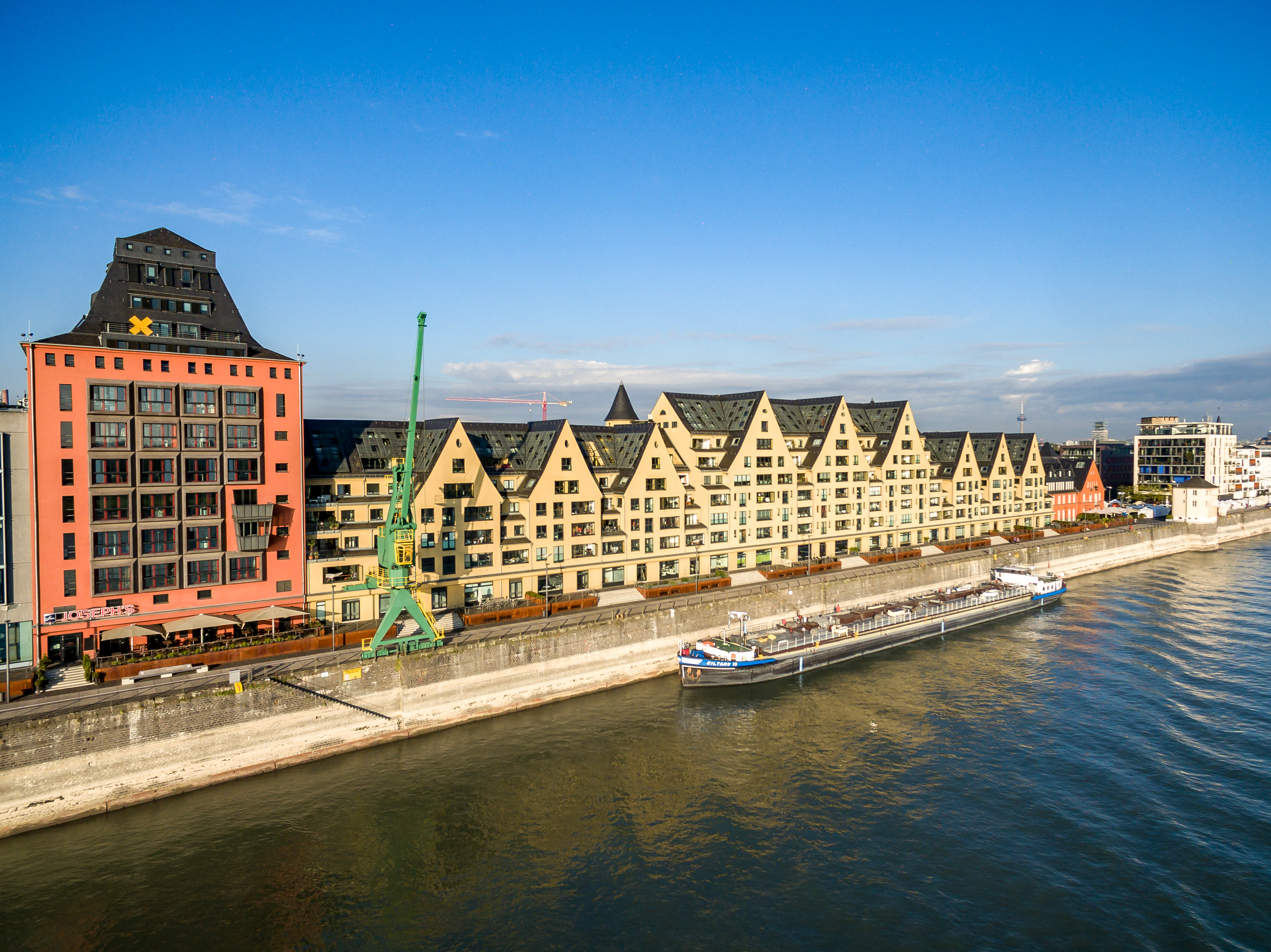 Rheinauhafen Köln mit Binnenschiff und ehemaligem Speicher "Siebengebirge"